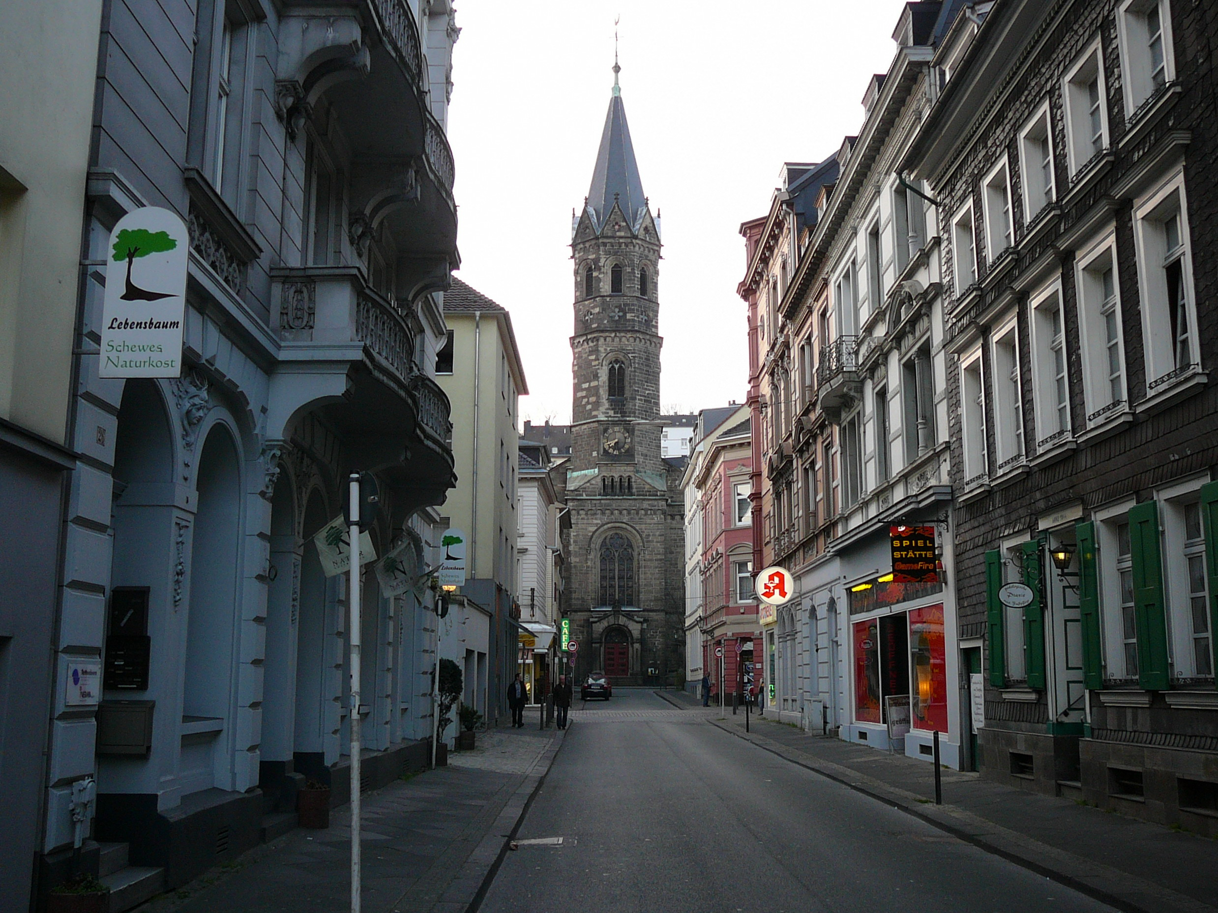 Neue reformierte Kirche auch Sophienkirche, Wuppertal